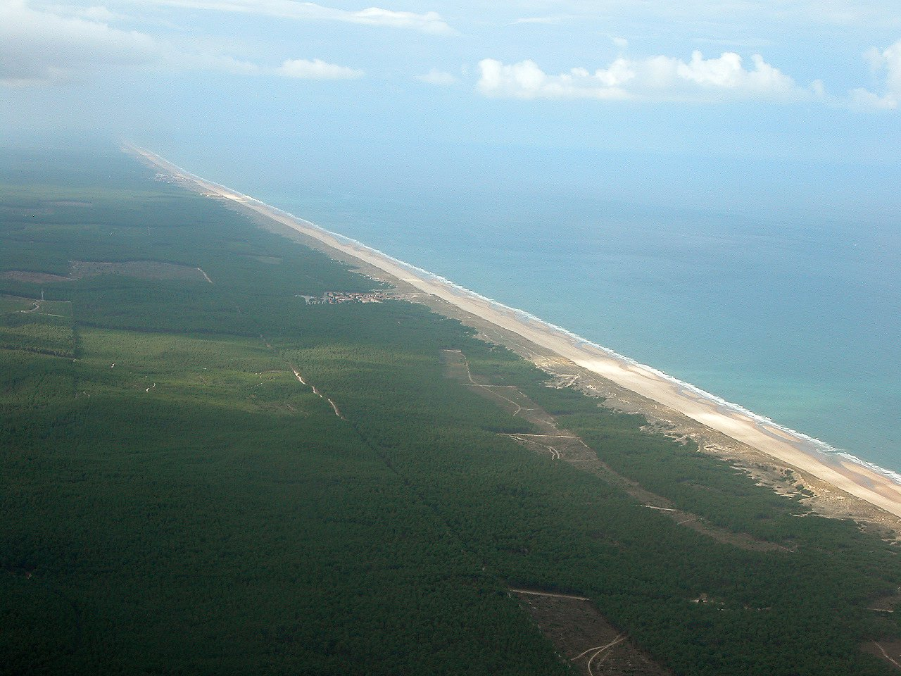 Photo de la Côte Médocaine Licensing Catégorie: Landes de Gascogne